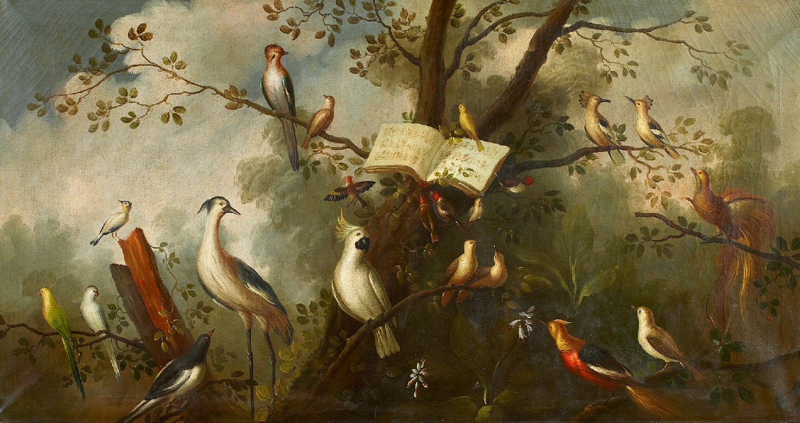 Vogelstudienlabel QS:Lde,"Vogelstudien"